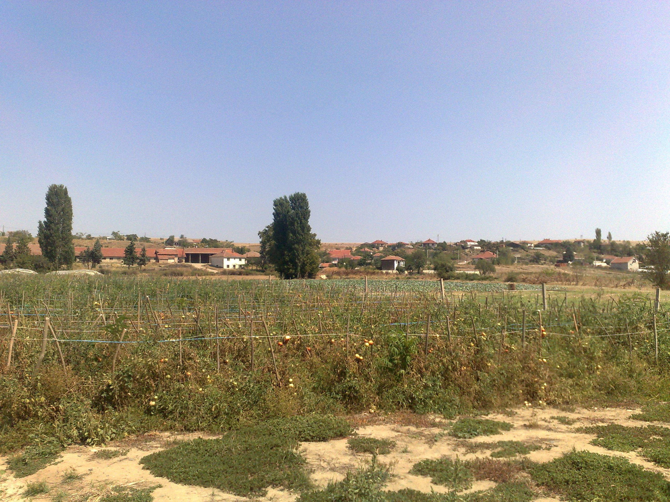 Одгледување на домати (патлиџани) во с.Ногаевци